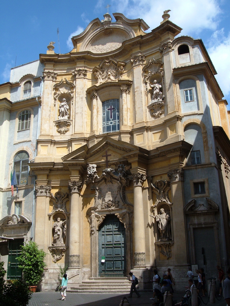 Chiesa di Santa Maria Maddelena (Roma). Foto scattata da me nel 2004.